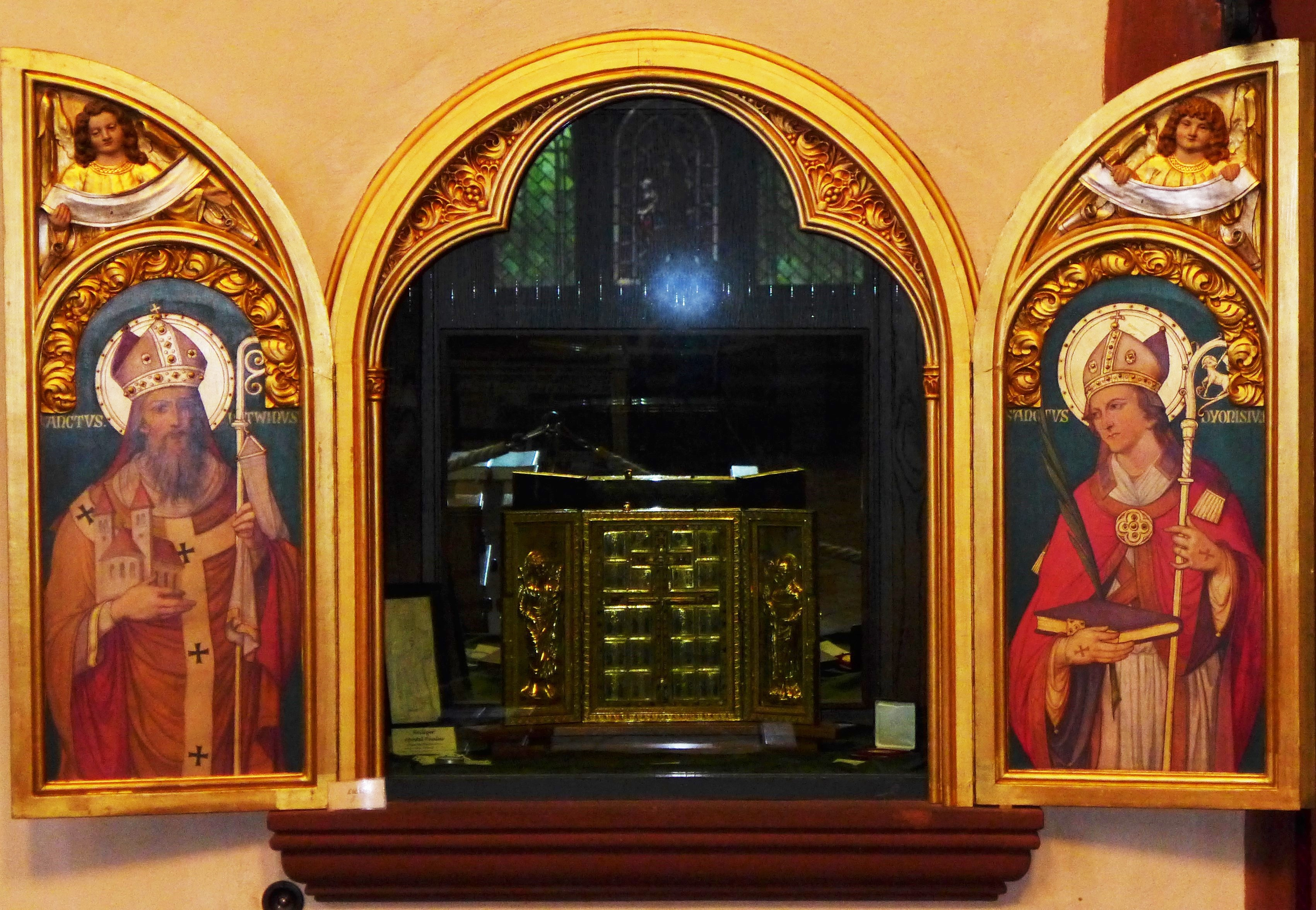 St. Luitwin (Mettlach), Ausstellungsnische der Mettlacher Staurothek, links der heilige Lutwinus, rechts der heilige Dionysius von Paris